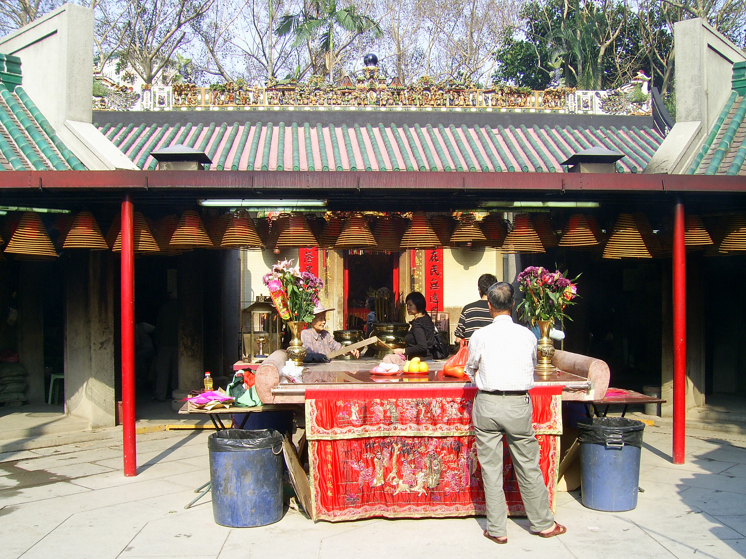 中文（香港）: 荃灣天后宮